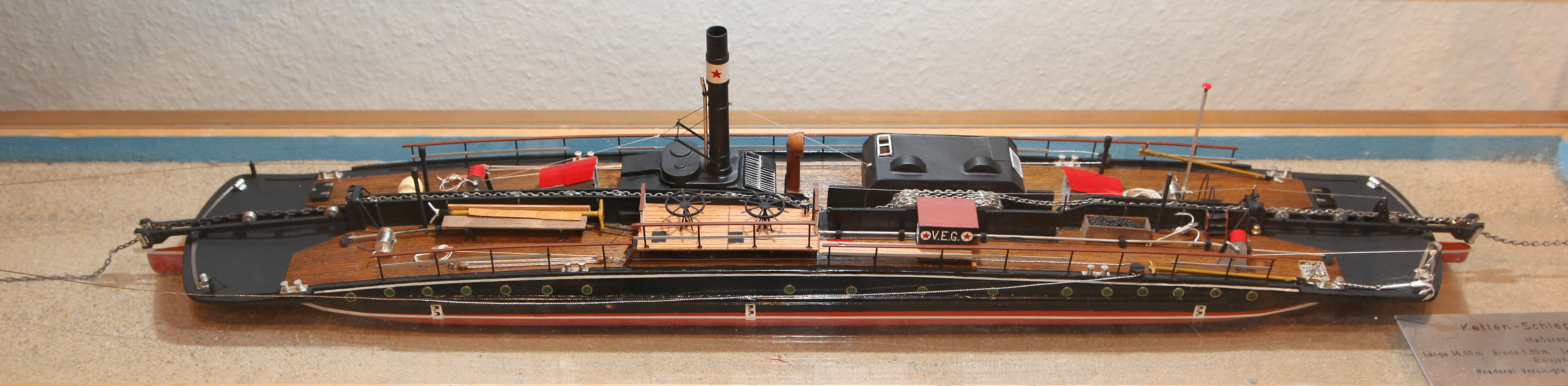 Ketten-Schleppdampfer (Maßstab 1:50) Länge 36,0 m, Breite 5,8m, Seitenhöhe 2,2m, Tiefgang 0,65m; Baujahr ca. 1885; Reederei: Vereinigte Elbeschiffahrtsgesellschaft Ausstellungsstück im Lauenburger Elbschiffahrtsmuseum, Lauenburg.